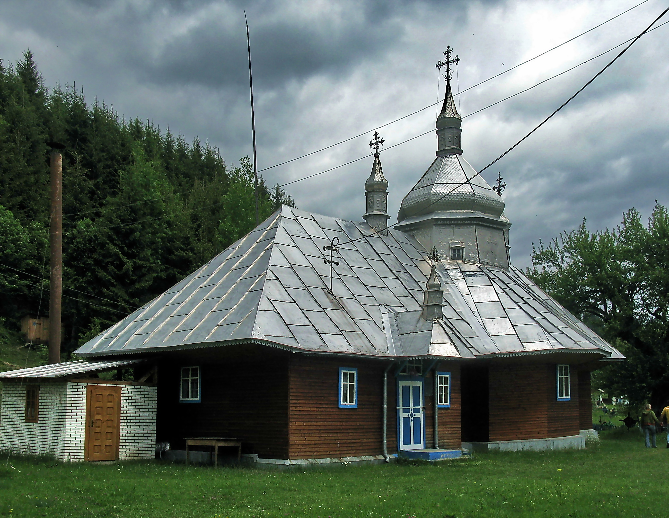 Церква Рiздва Богородицi (дер.), Селятин